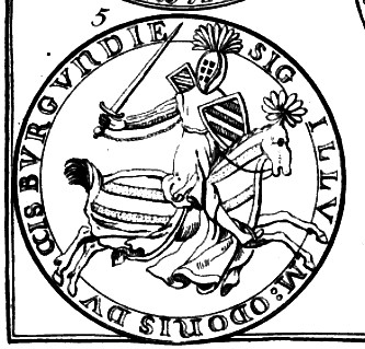 Odo IV. Burgundský